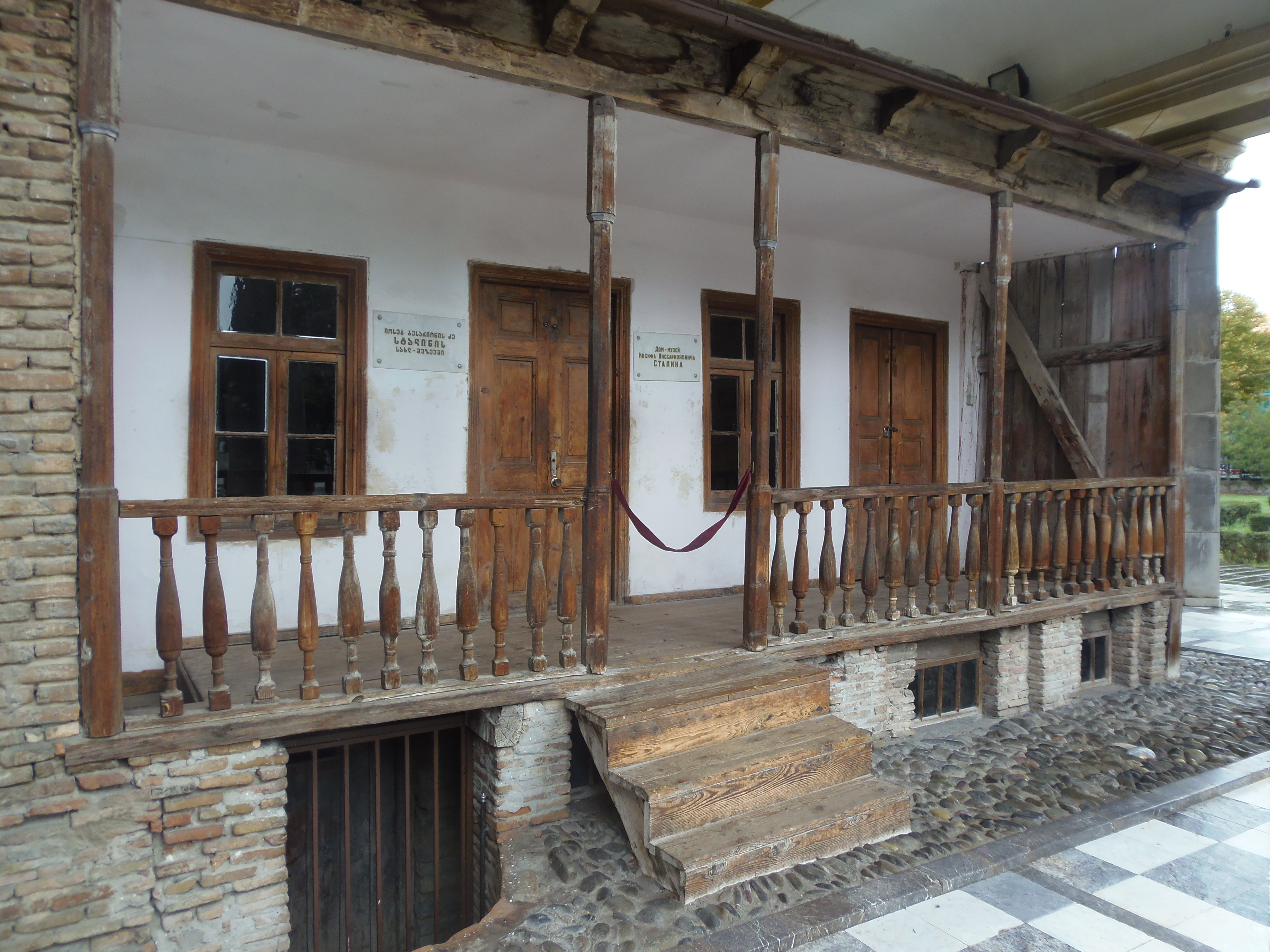 Rodný dům Josifa V. Stalina